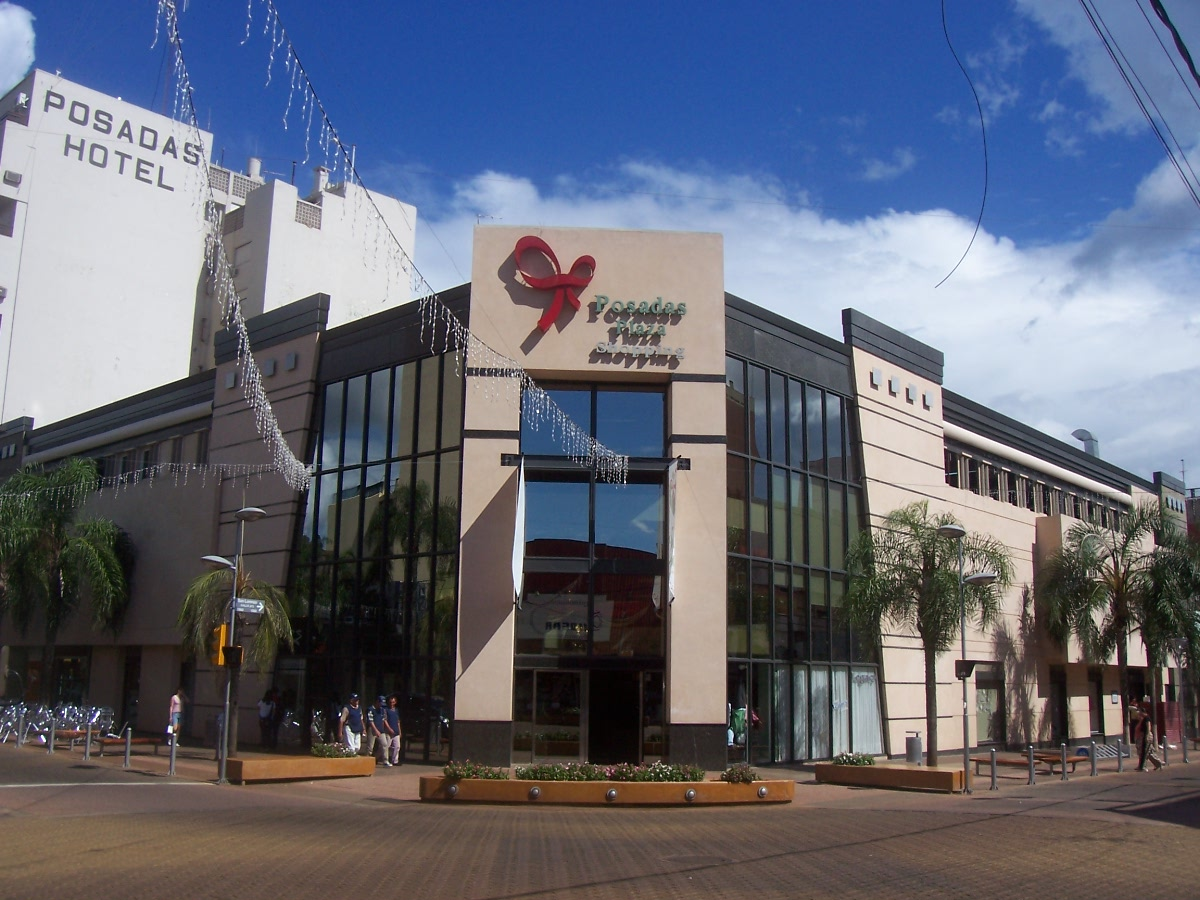 El Posadas Plaza Shopping, ubicado en la esquina de Colón y Bolivar, pleno centro de la capital misionera.